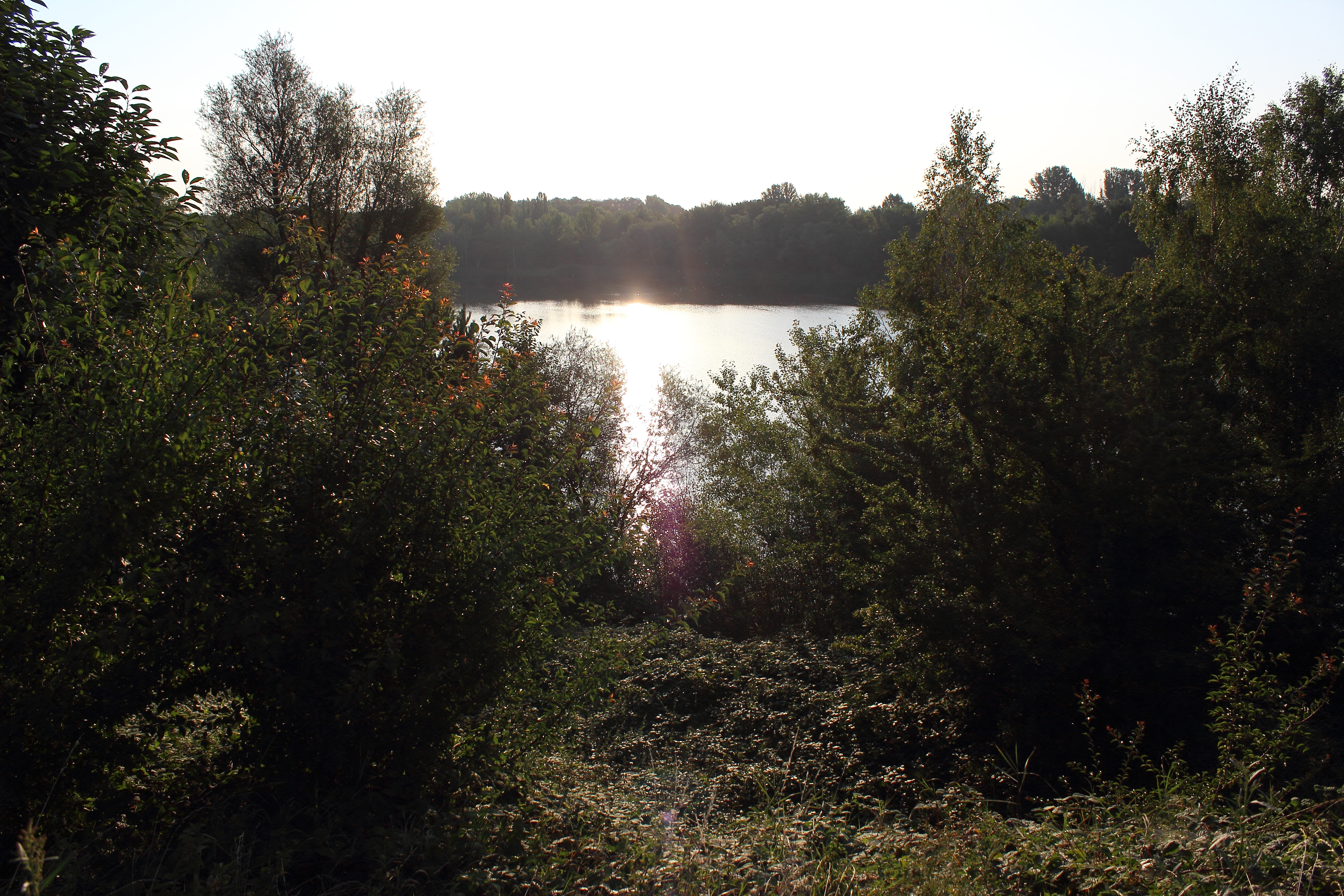 Der Friedhofsteich - Ansicht von Westen - 24.08.2013